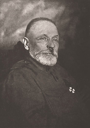 Генерал от инфантерии Евгений Александрович Радкевич